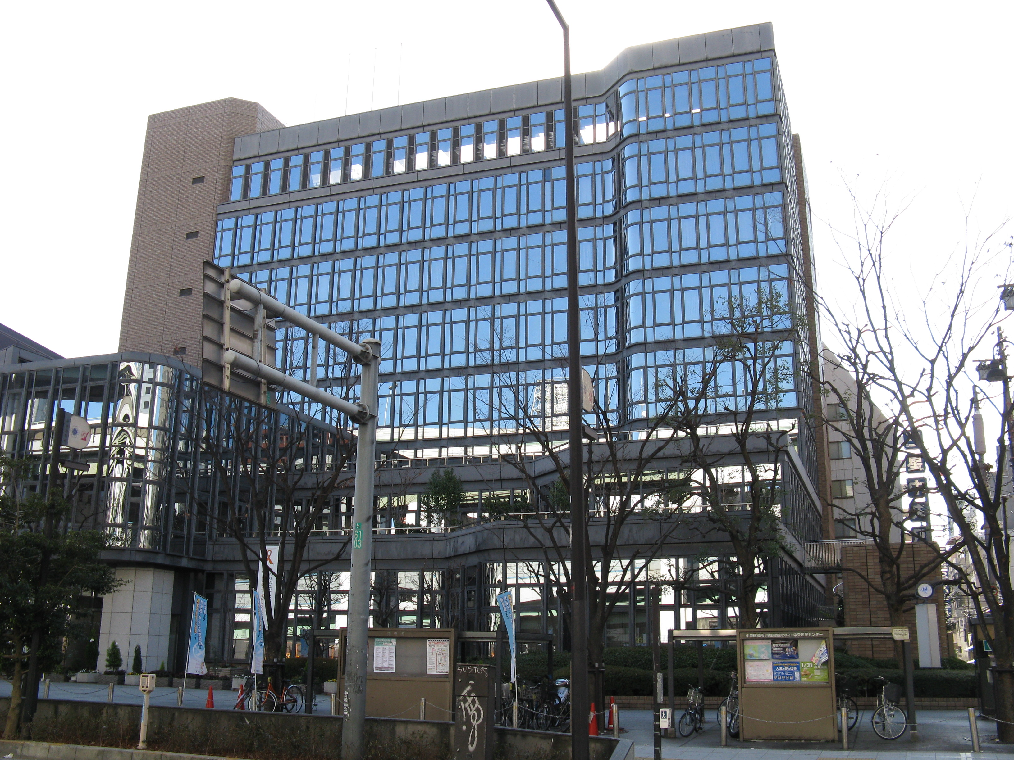 大阪市中央区役所